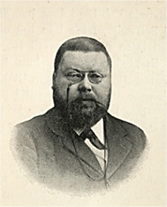 Journalist Hans Peter Brekke - 1903 eller tidligere.